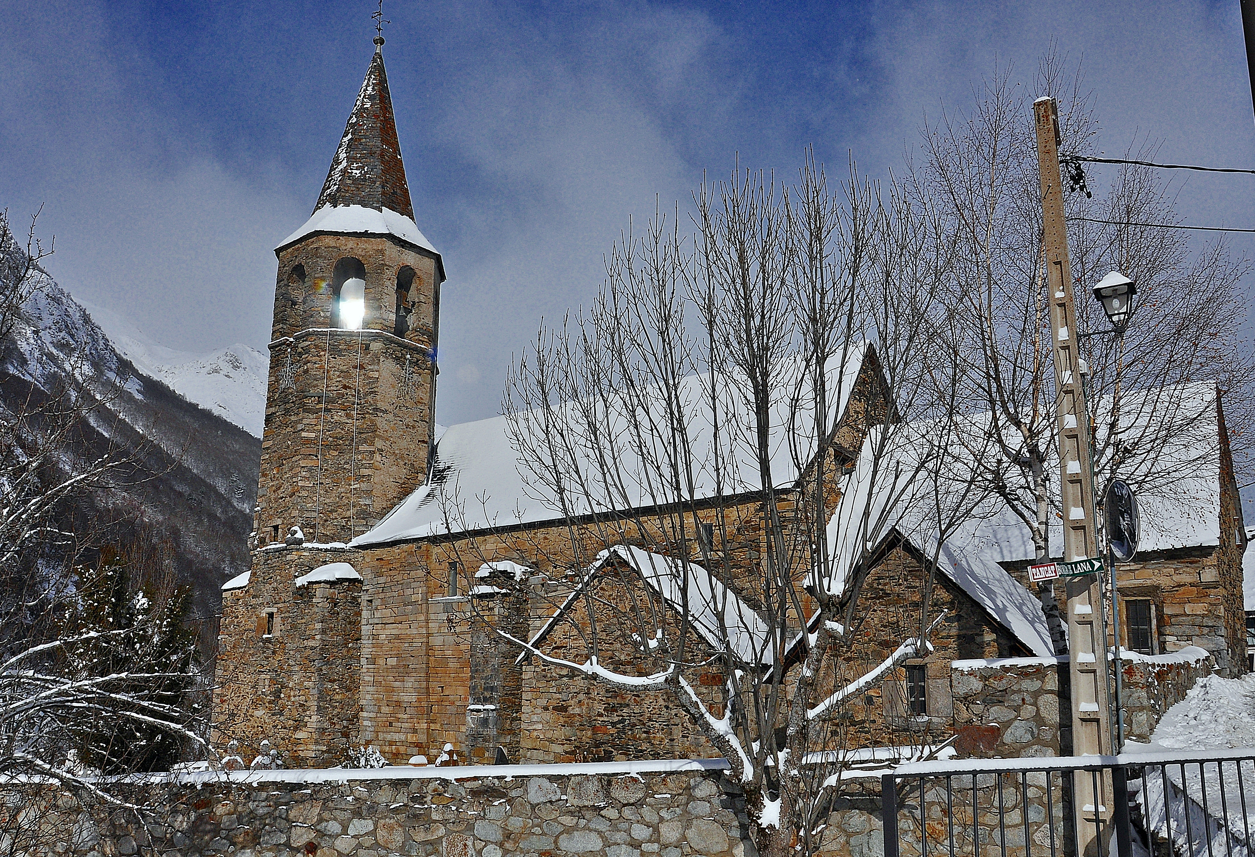 Valle de Aran-2016